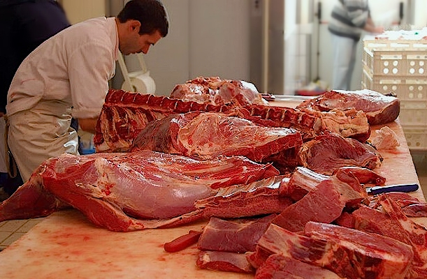 Auslösen: Zerlegung von geschlachteten Rinderhälften bzw. -teilen in zur Weiterverarbeitung geeignete Teile.